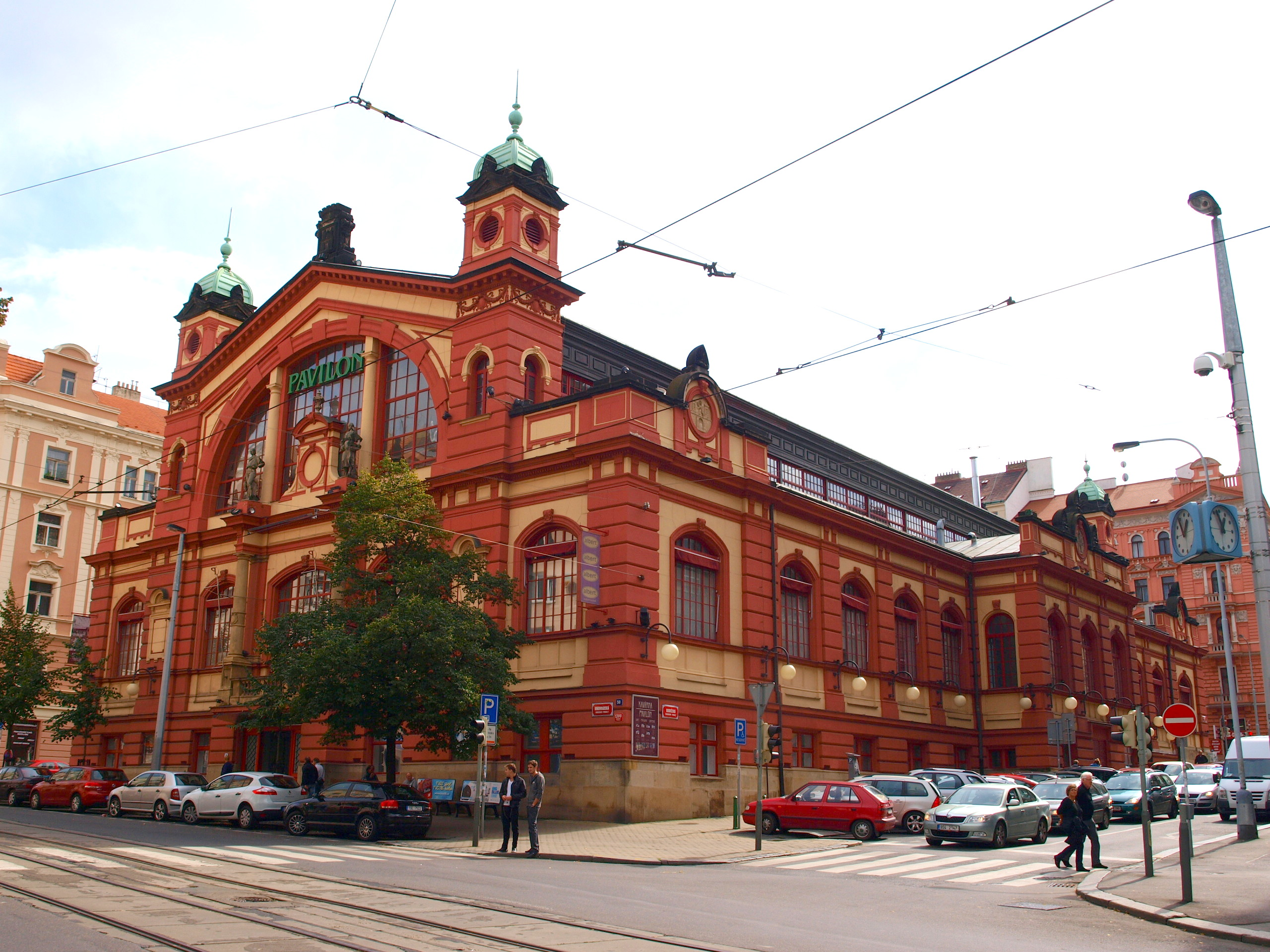 Vinohradská tržnice